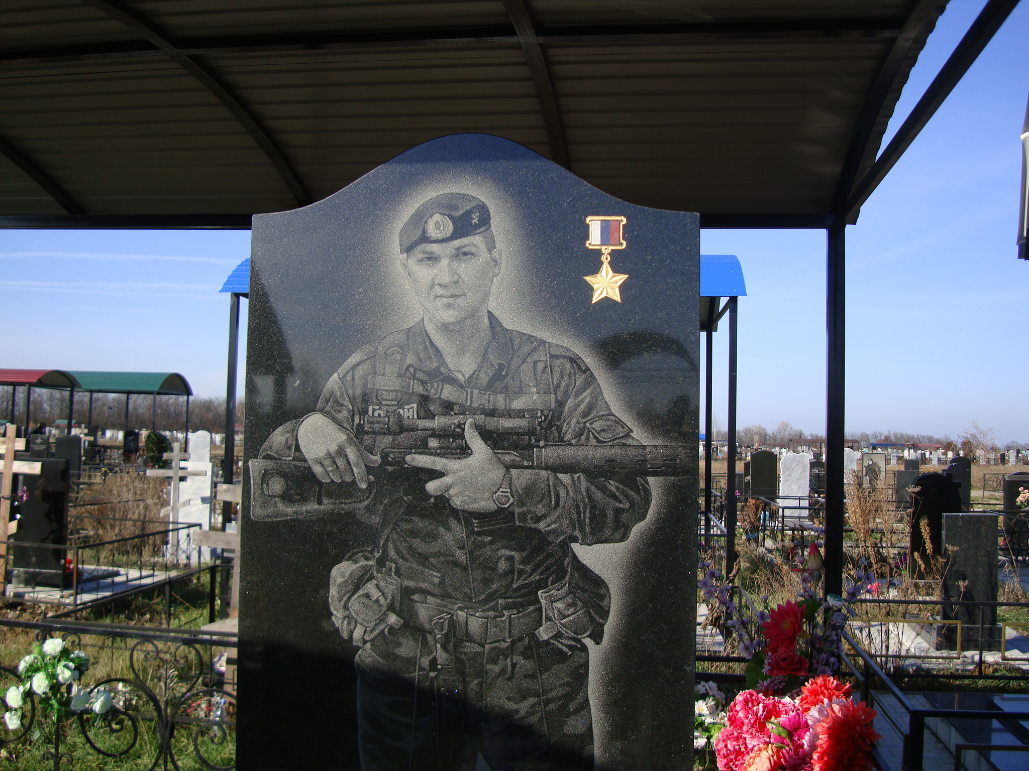 Памятник Гармашу А.В. (фрагмент обр. стороны)